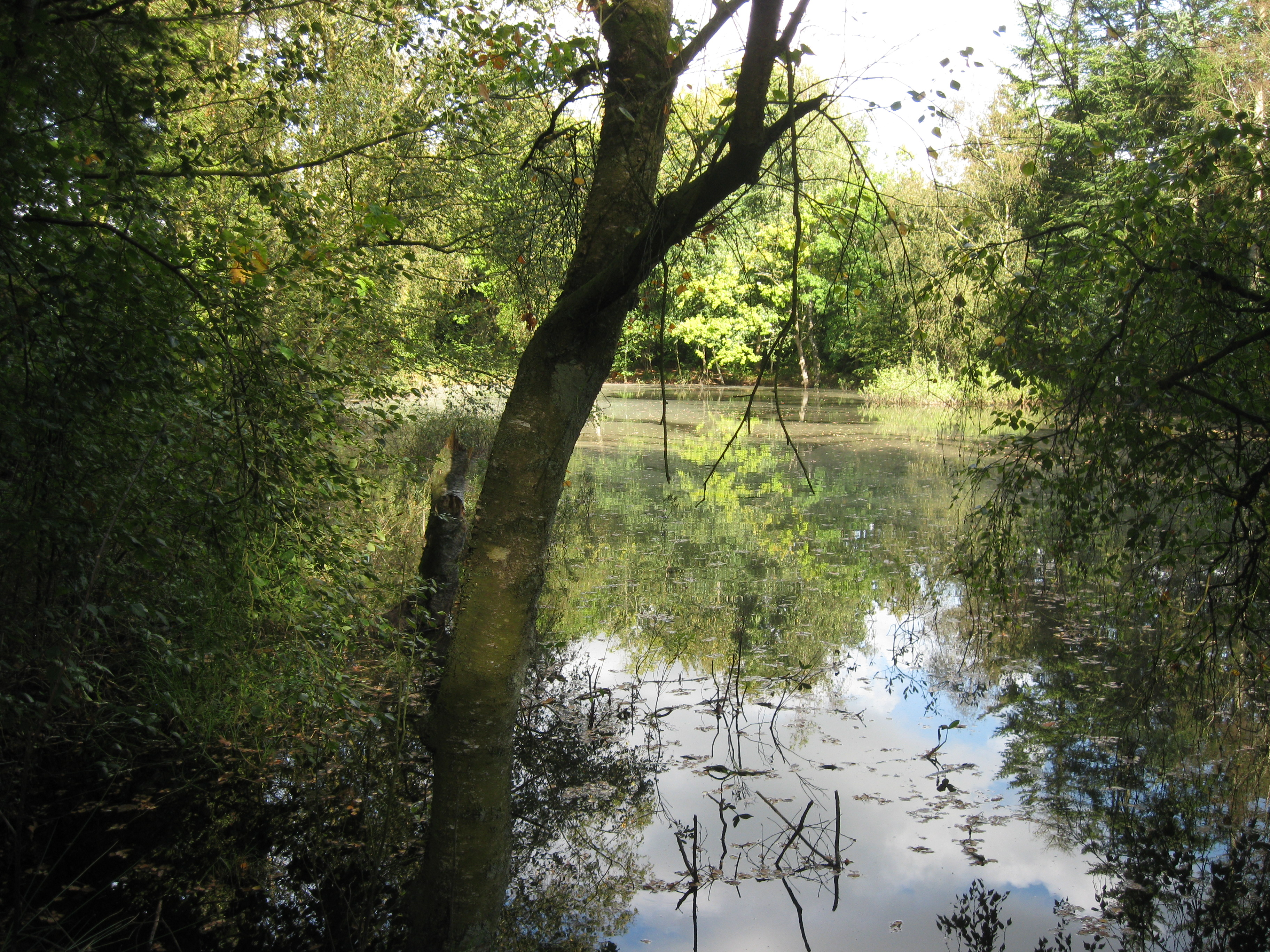 Rønhede Plantage ved Bedsted Thy